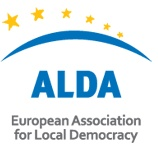 Logotipo de Asociación